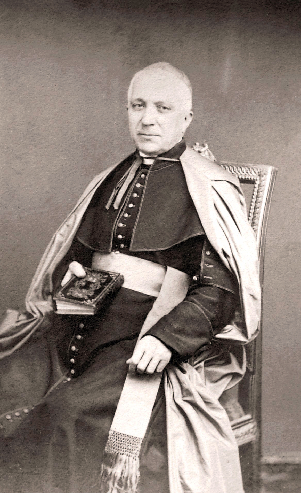 Prospero Kardinal Caterini (1795-1881), vatikanischer Präfekt